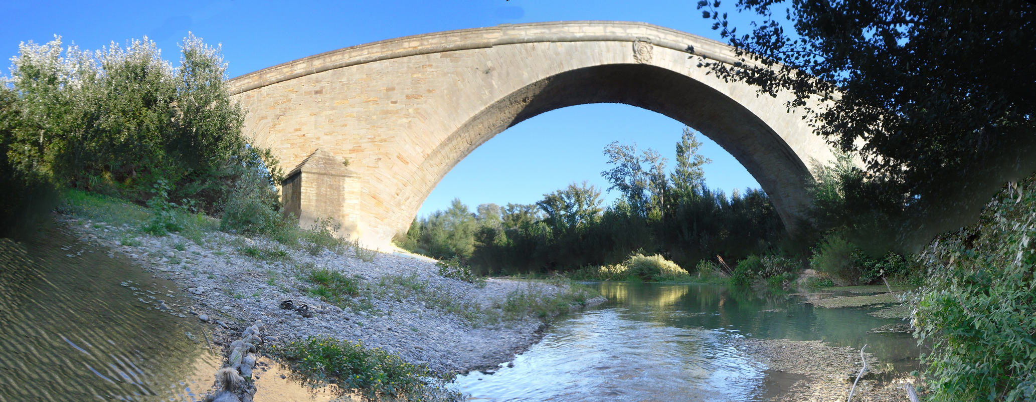 Pont des Etats du Languedoc sur l'Orbieu à Ornaisons